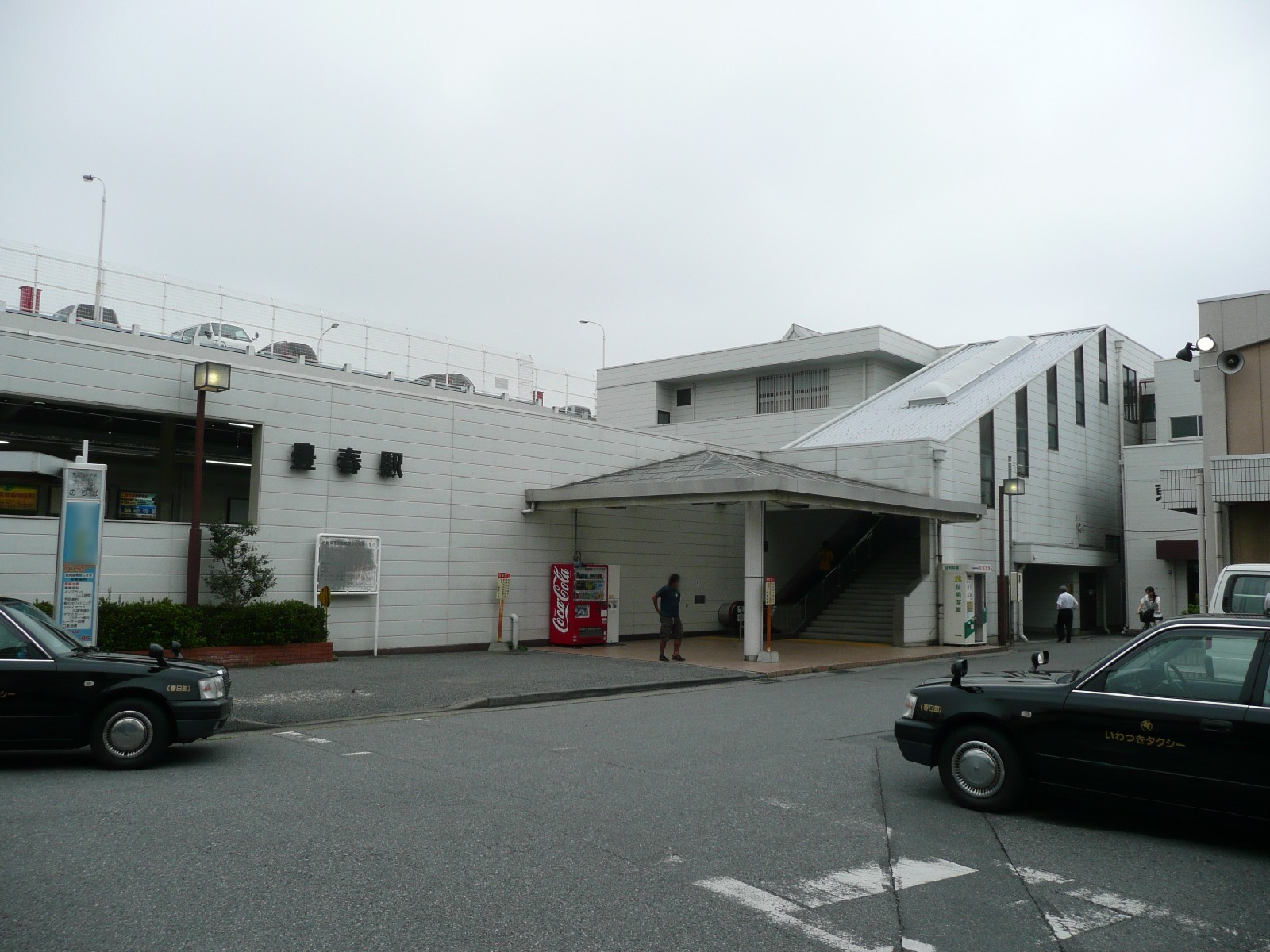 豊春駅東口